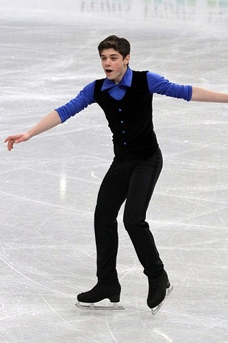 Луиз Манелла (Бразилия) на чемпионате мира по фигурному катанию среди юниоров 2012